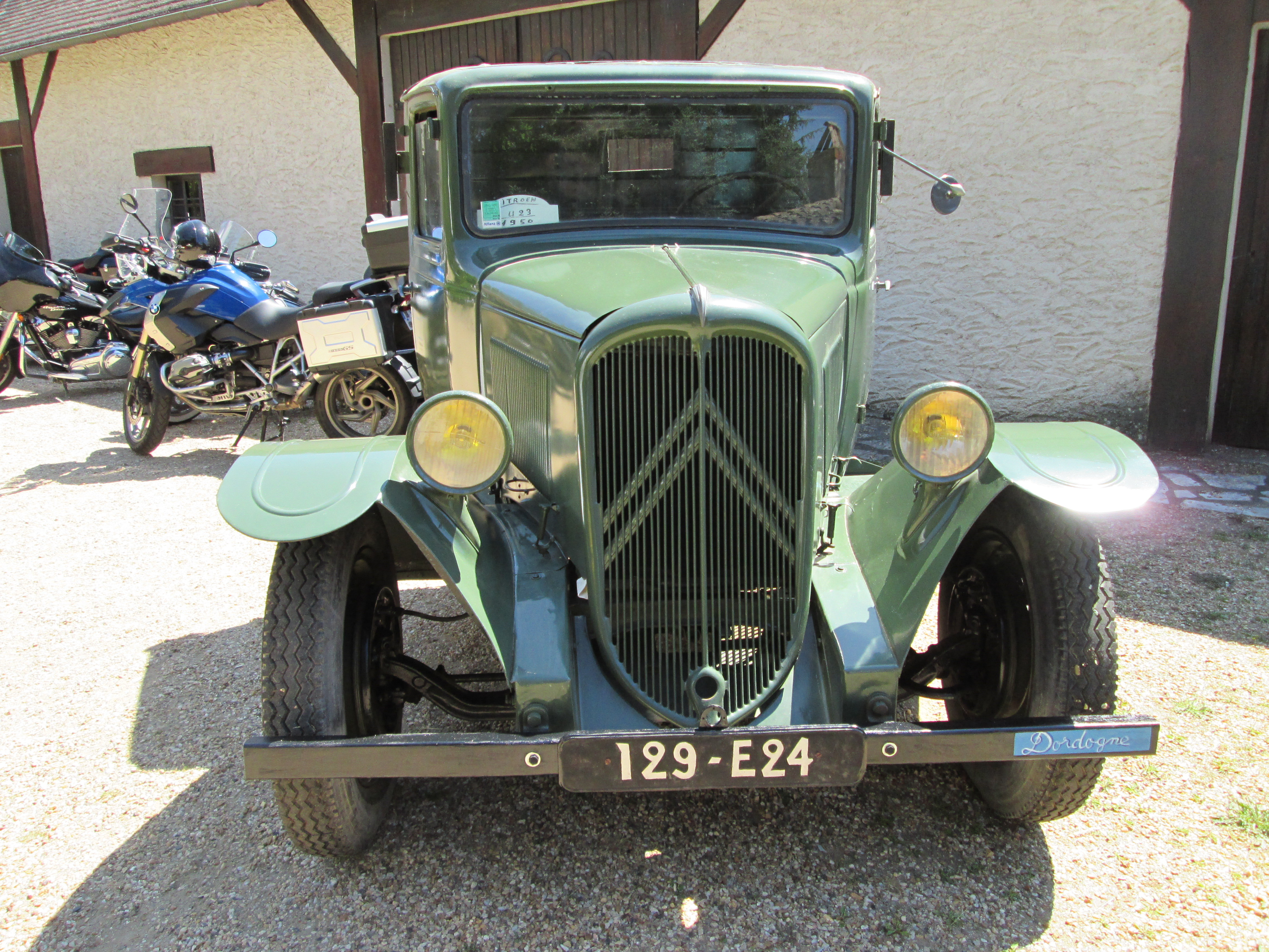 Camion Citroën U23 de 1950.